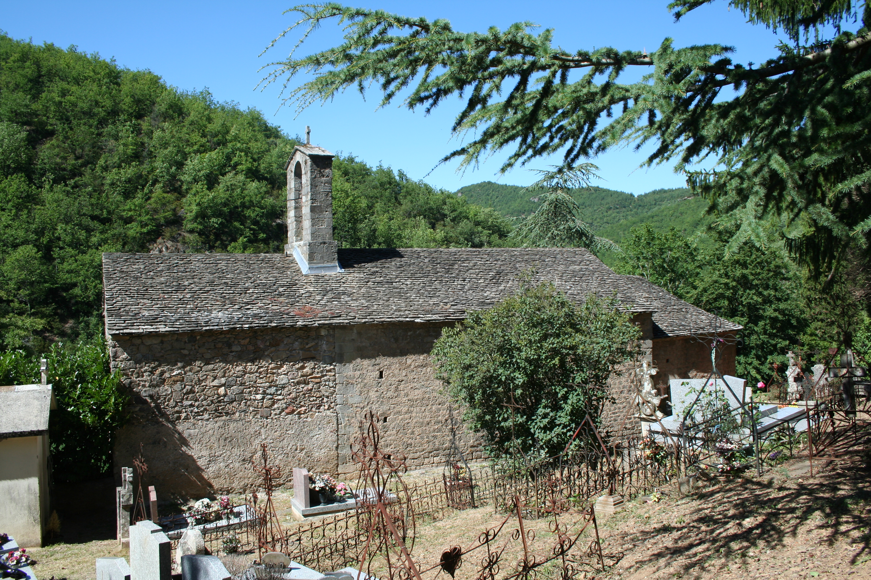 Avène (Hérault) - Église romane Saint-André de Rieussec.